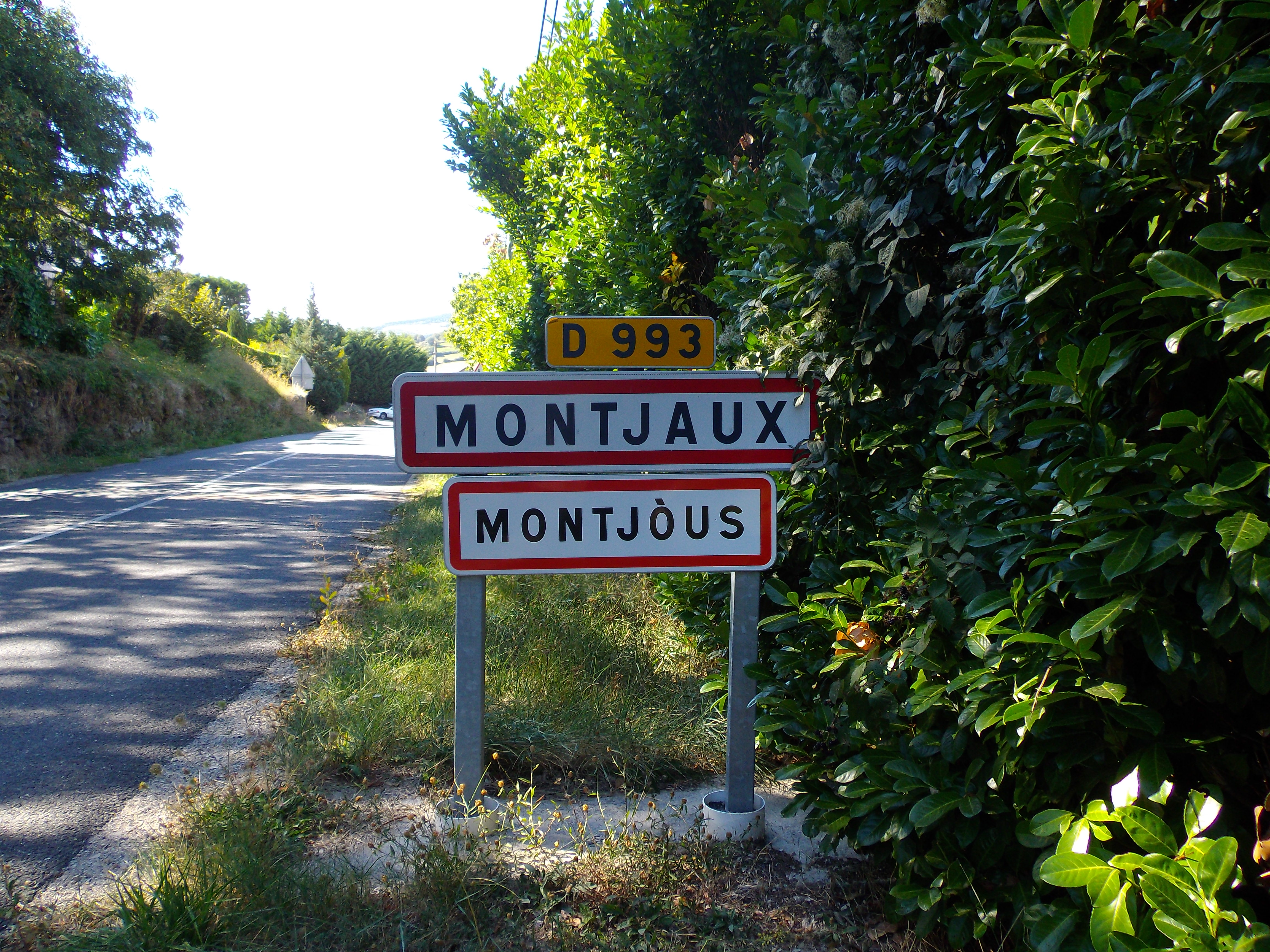 Panneau bilingue français-occitan à l'entrée de Montjaux (Aveyron, France)